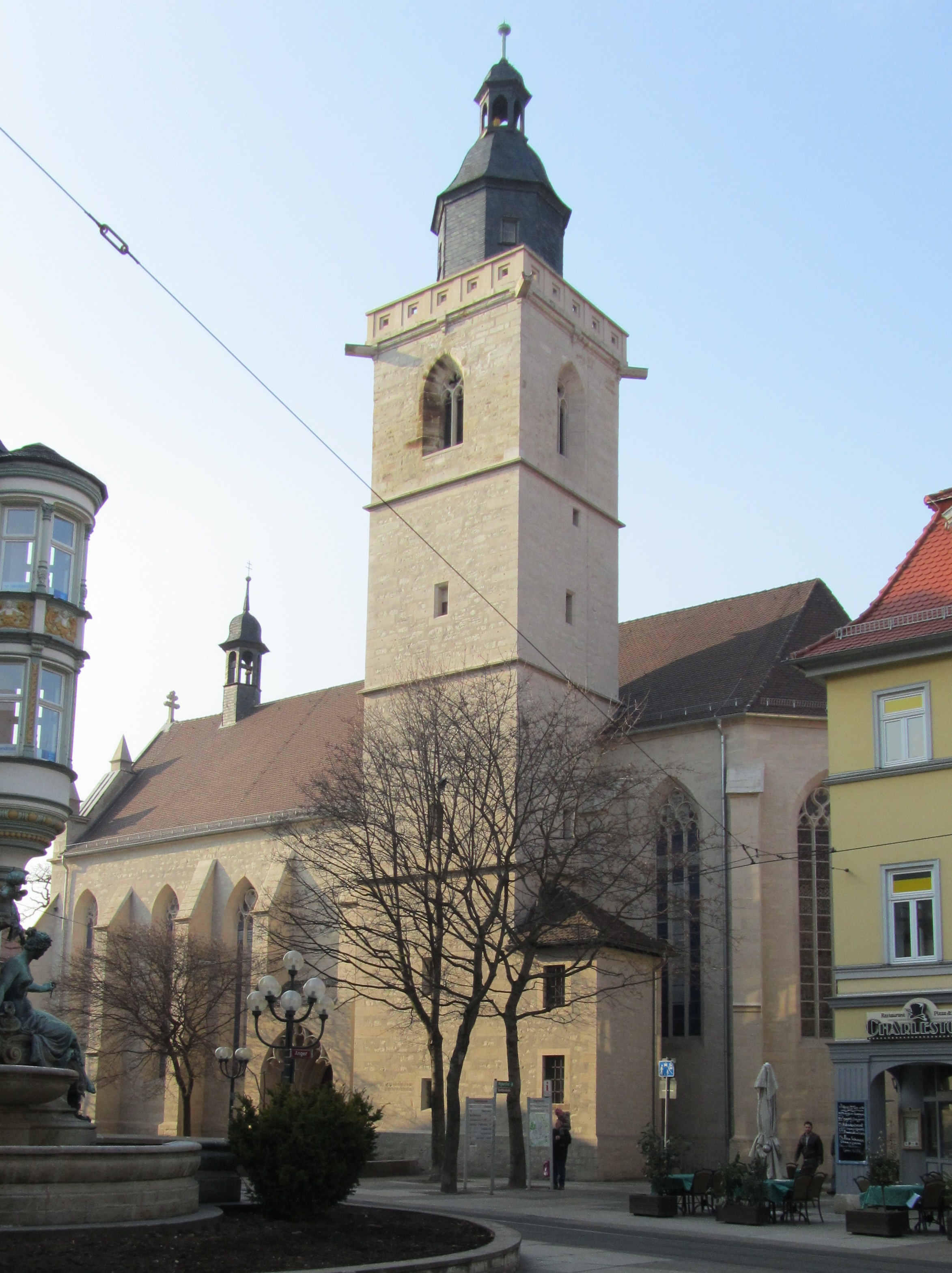 Die Wigbertikirche am Anger in Erfurt.